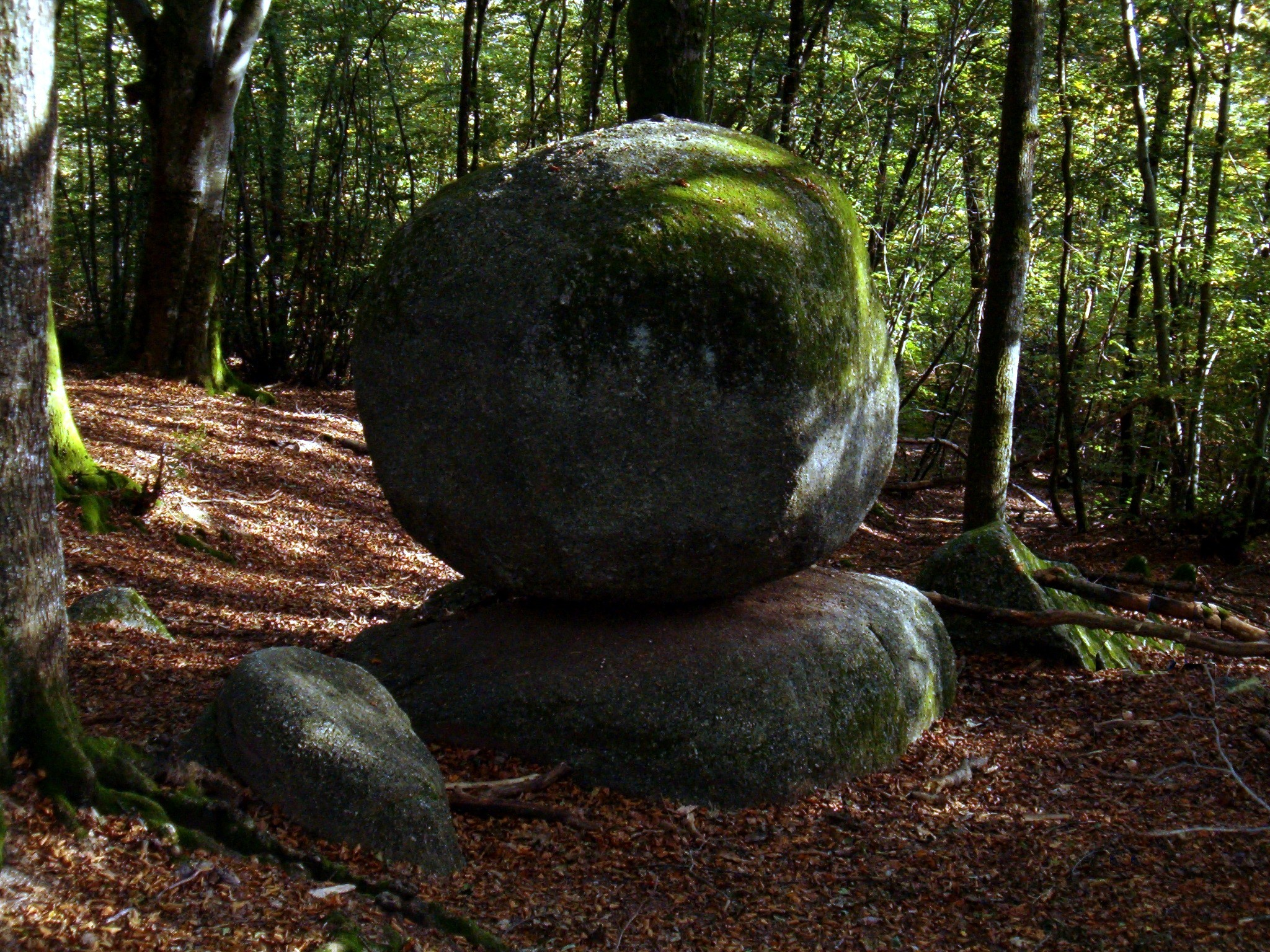 Chaos granitiques "Pierre-qui-croule" sur le site d'Uchon en Saône-et-Loire (France)